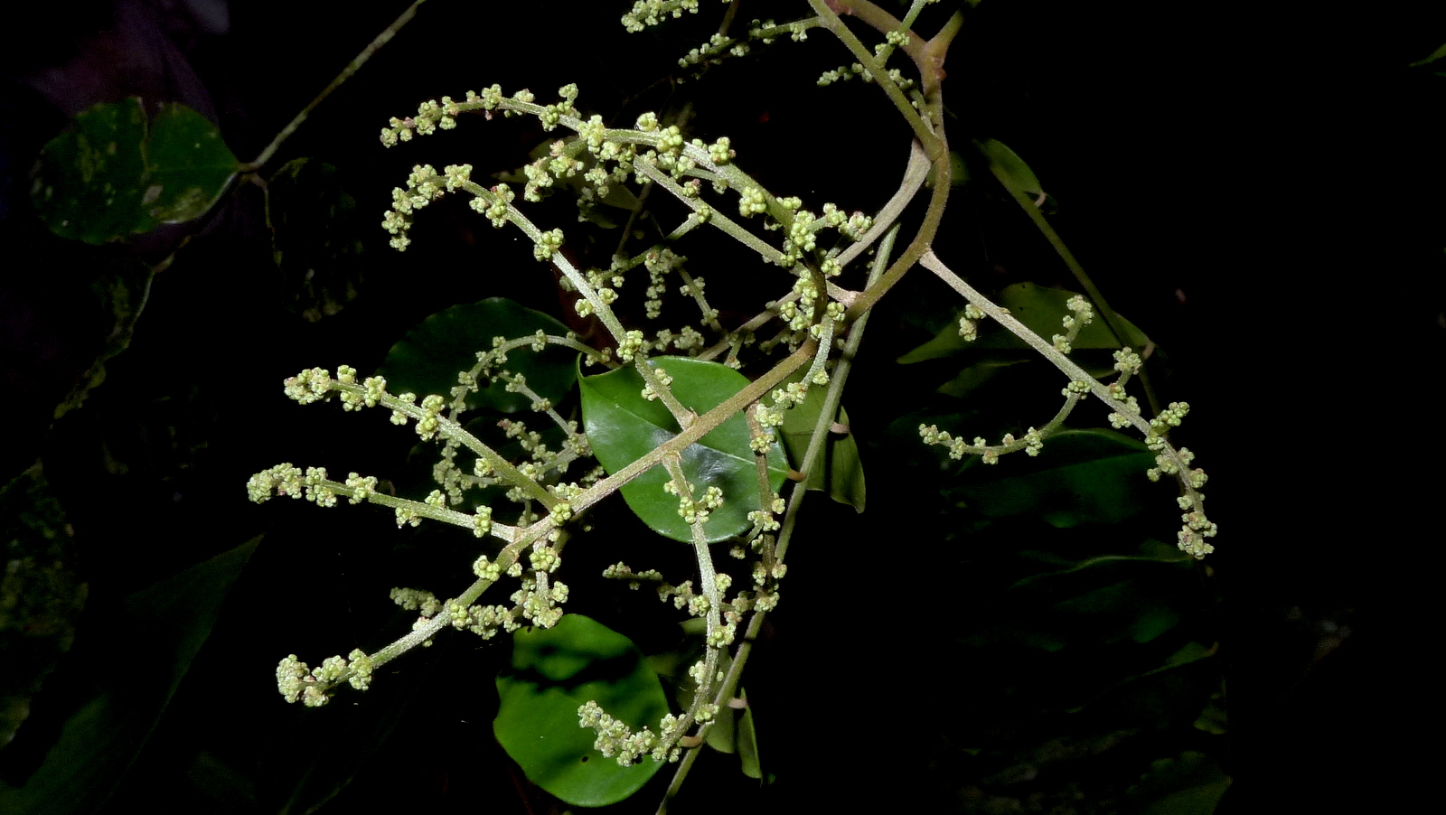 Picramnia glazioviana Engl.